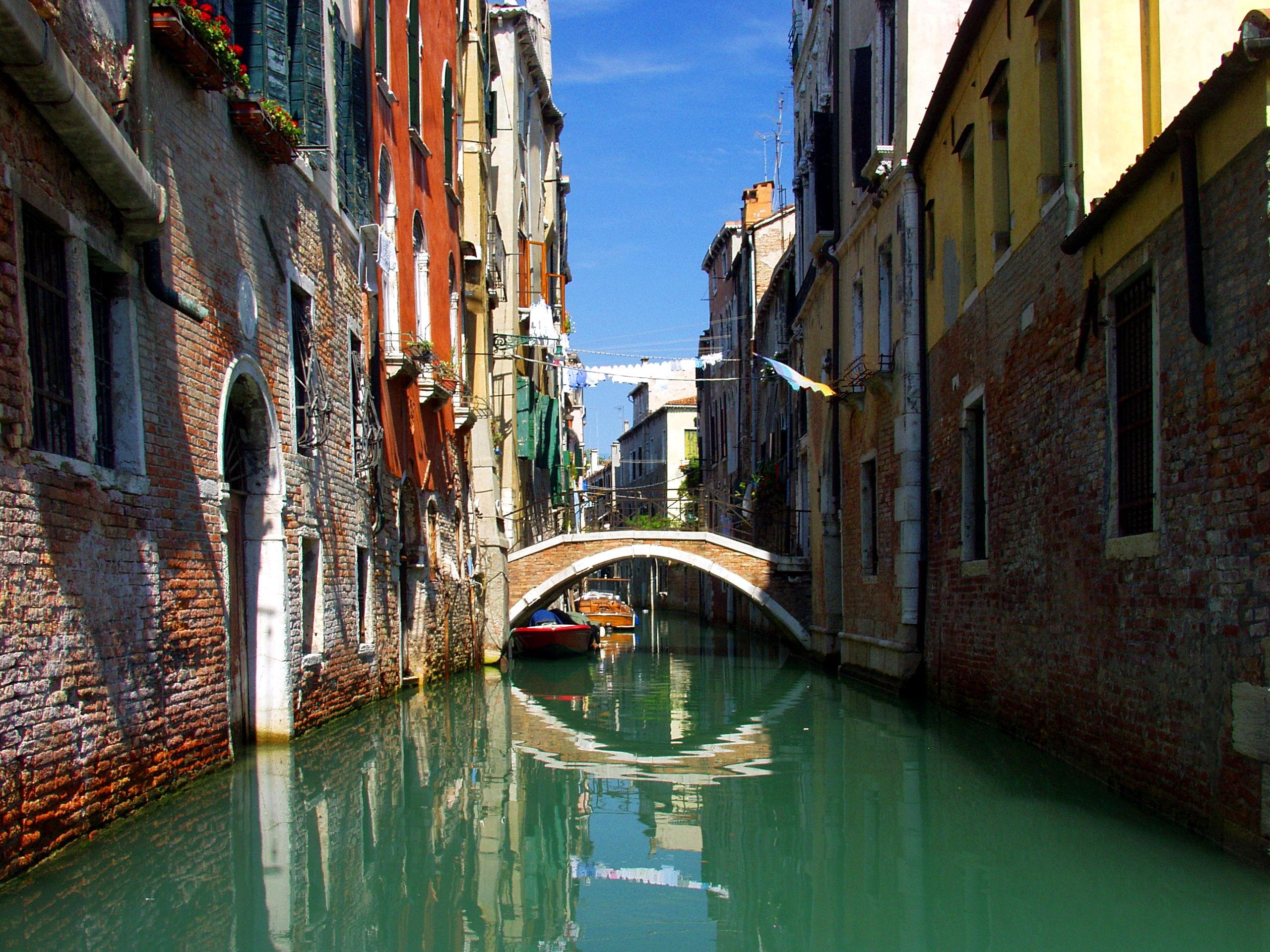 Canal in Venice